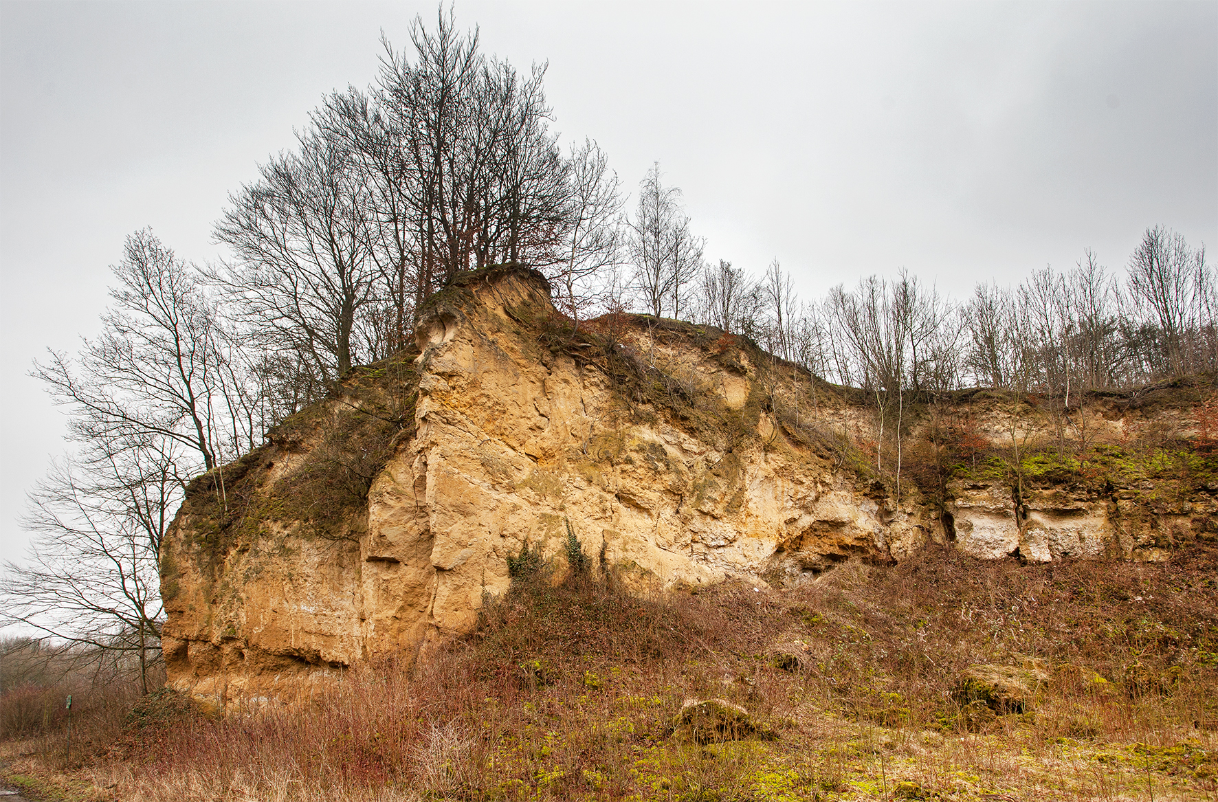 Der Doberg in Bünde, Kreis Herford, Nordrhein-Westfalen